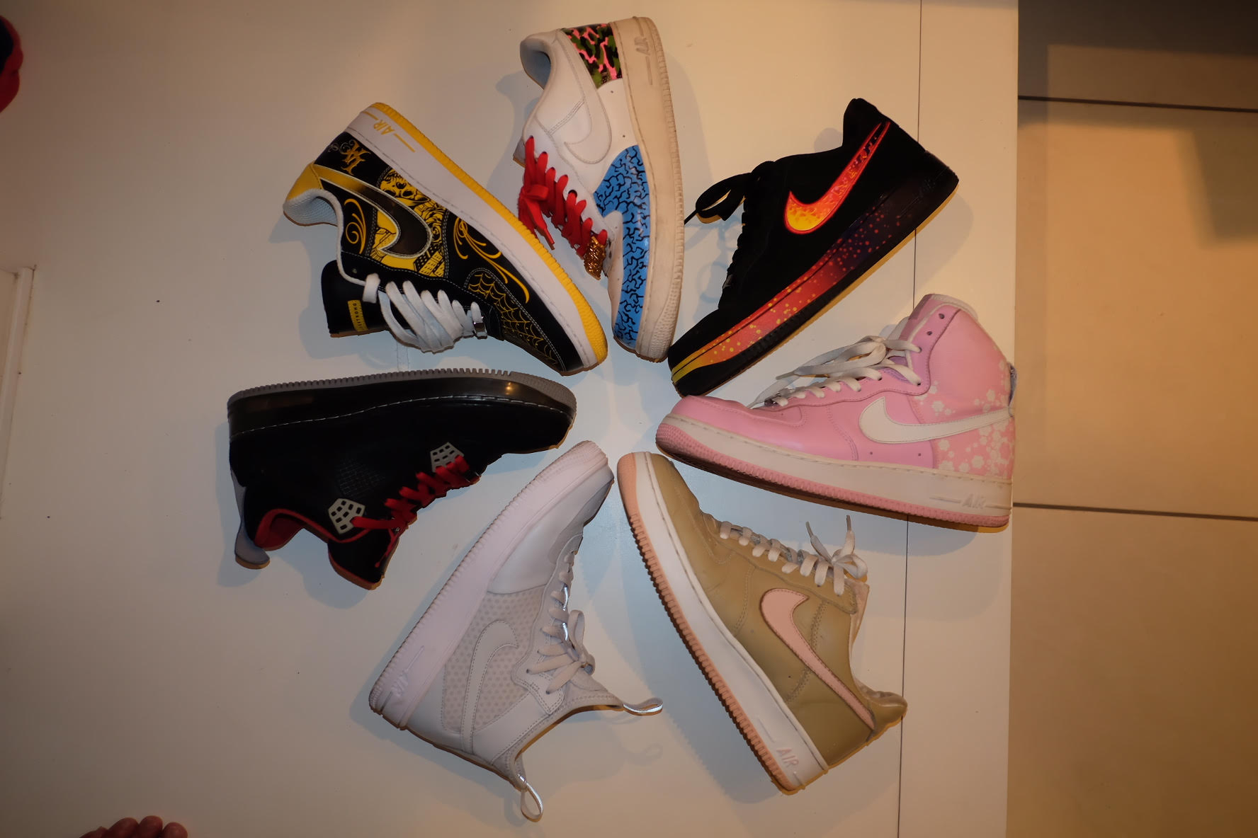 ナイキ エア・フォース1の様々なカラーバリエーション